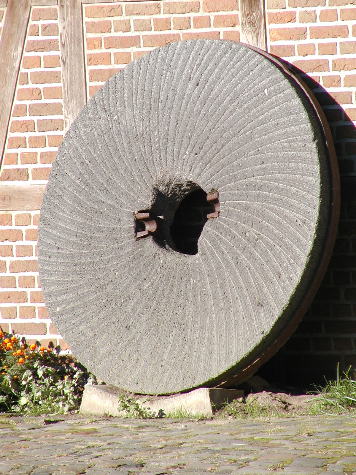 Der Mühlstein